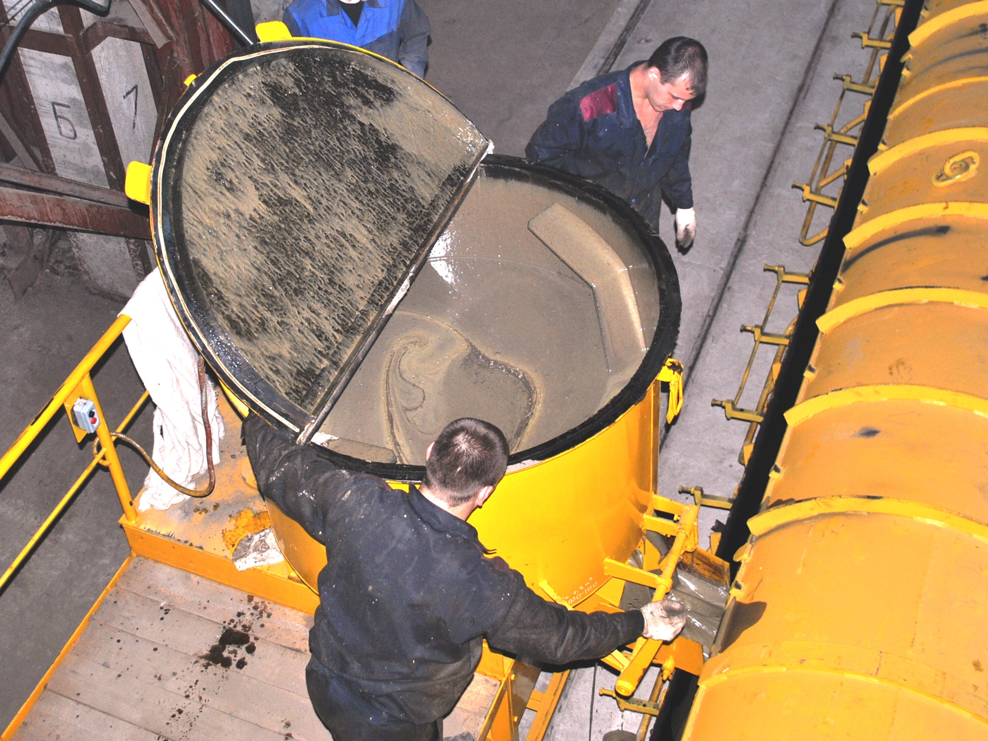 Смеситель компонентов с механической мешалкой и электроприводом. Поцесс перемешивания компонентов в смесителе.